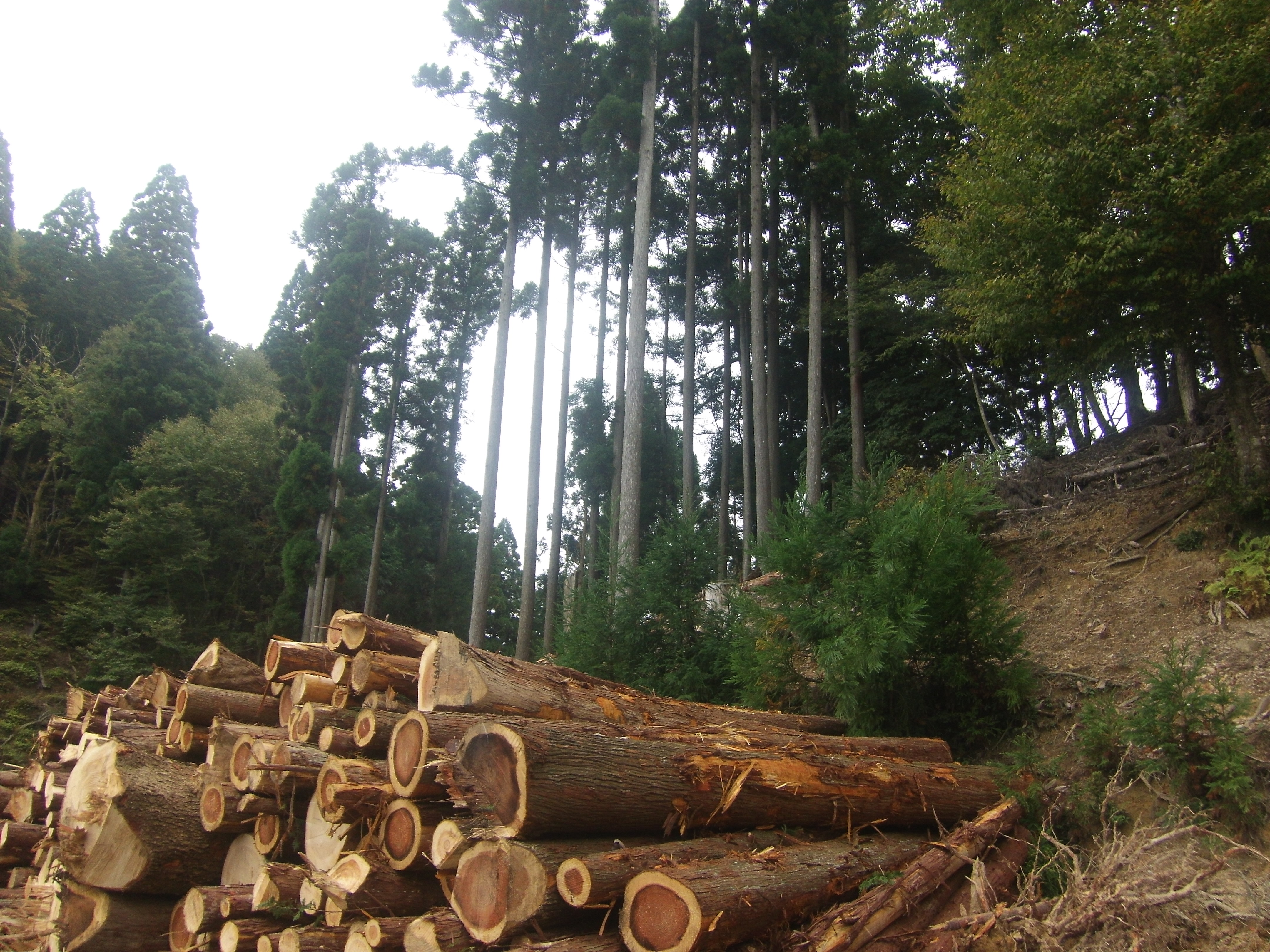 京都市右京区片波山界隈での北山杉による林業